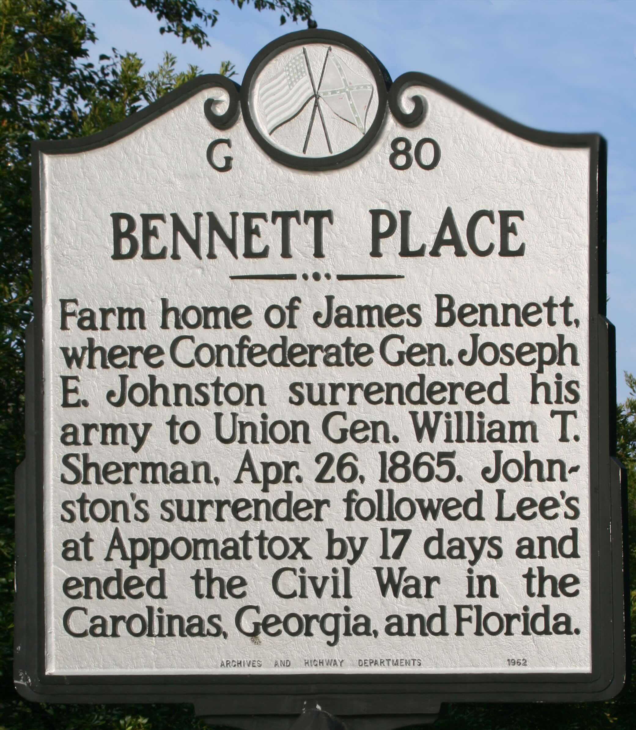 Bennett_Place_plaque